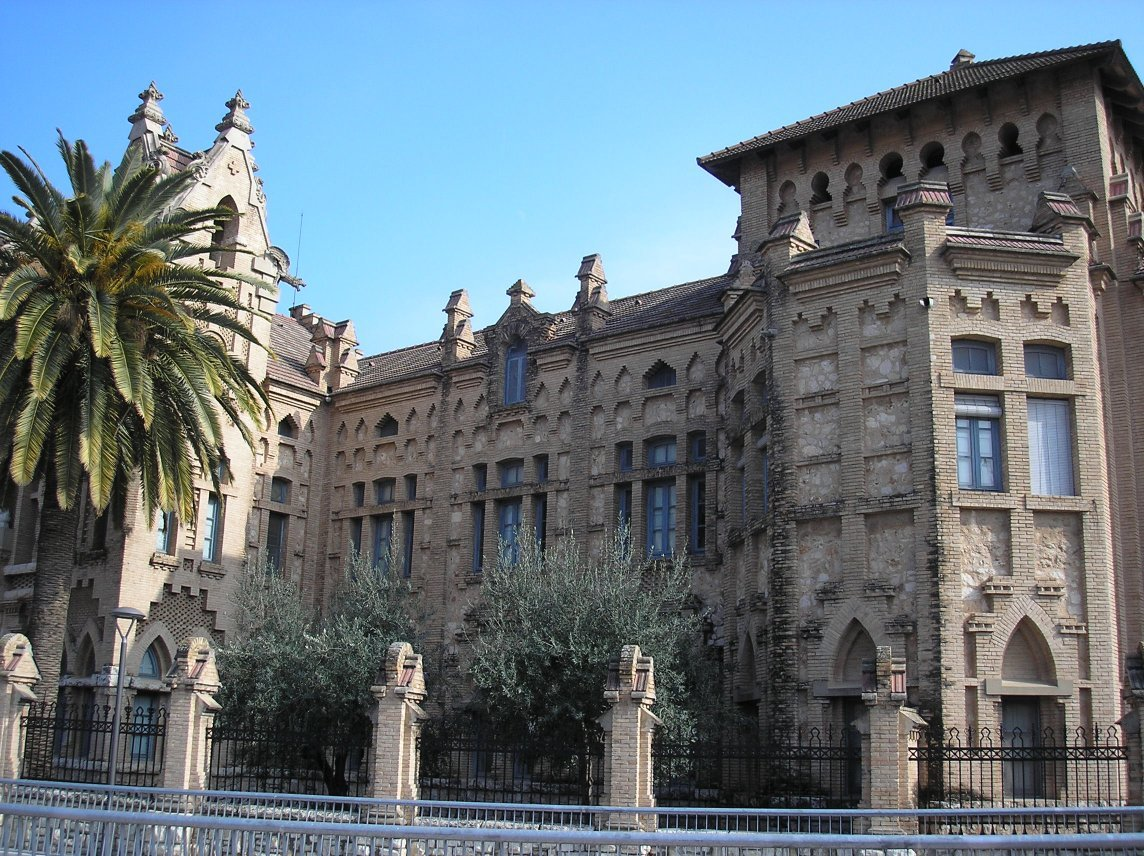 Sueca és un municipi valencià a la comarca de la Ribera Baixa. Asil d'ancians, arquitectura modernista de Buenaventura Ferrando.